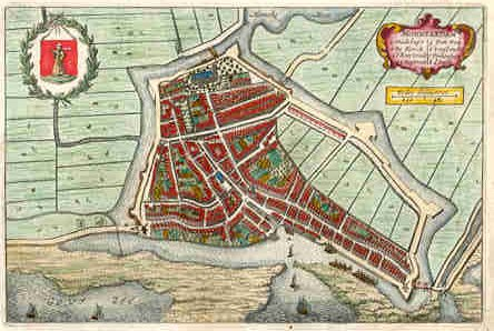 title=Monnikendam; size=1/4 double folio